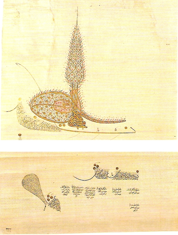 Tughra und Unterschrift als Zeuge (rechts unten) des Tevki'i (Nişanci) Cafer auf einem Mülkname von Sultan Mehmed IV. vom Juni 1662 (Ausschnitt)